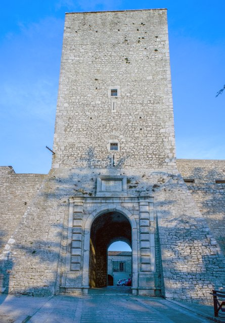 Wikipedia: Casalbore.